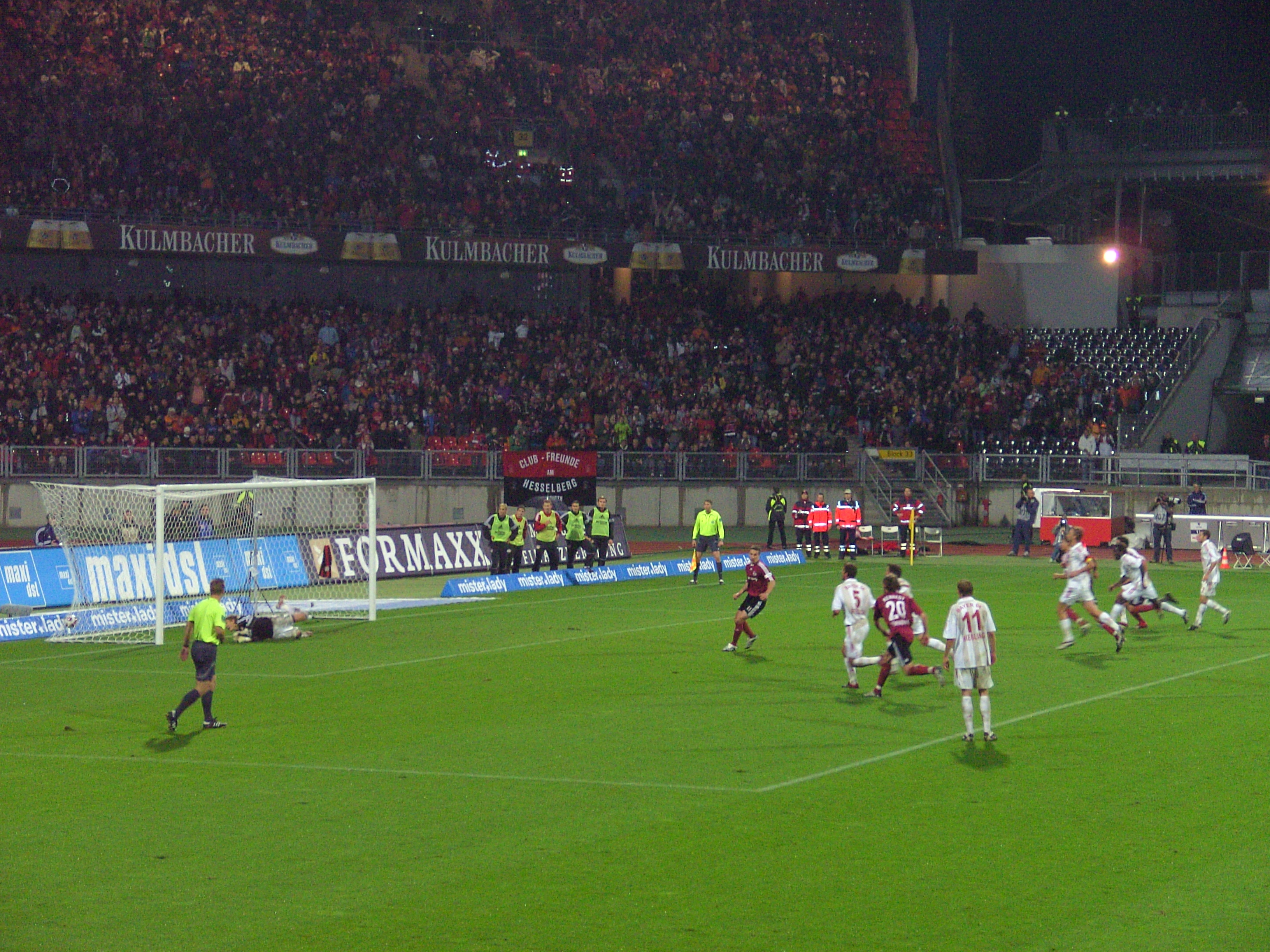 Elfmeter zum 1:1 für den 1. FC Nürnberg beim Spiel 1. FCN gegen Bayer 04 Leverkusen am 26. September 2007 (Endstand: 1:2).